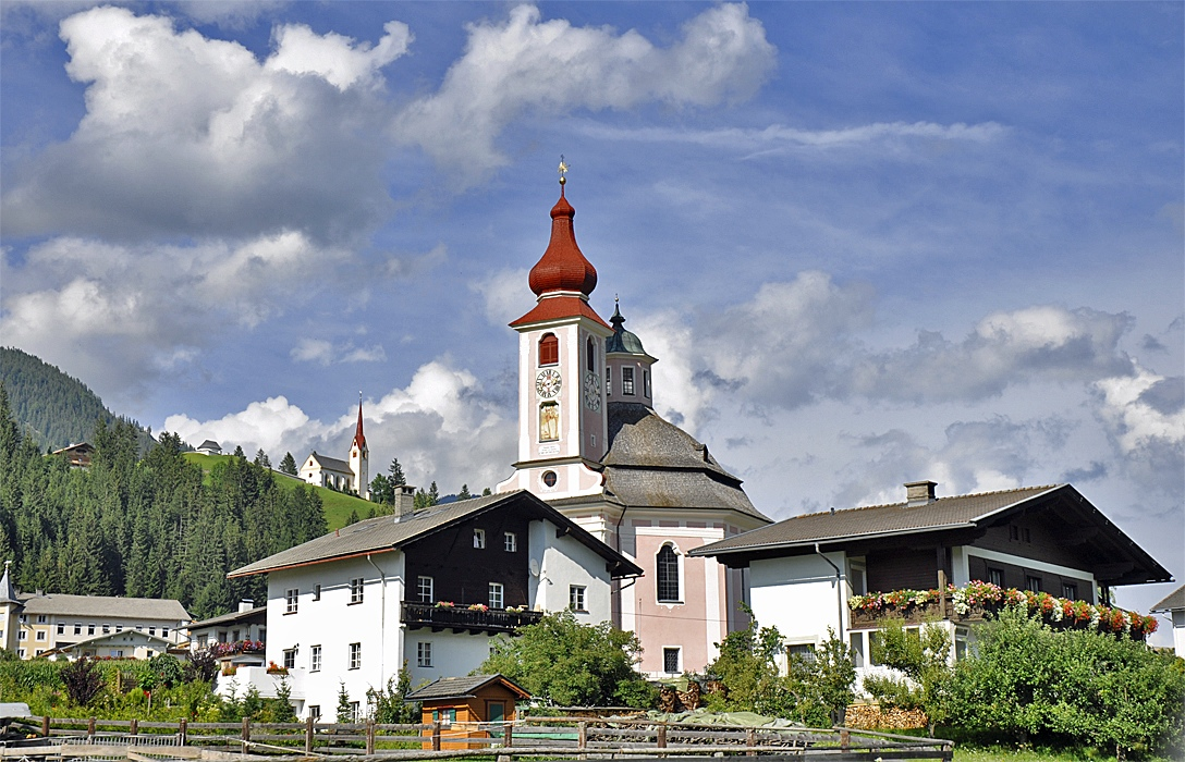 Strassen im Osttirol mit der Dreifaltigkeitskirche